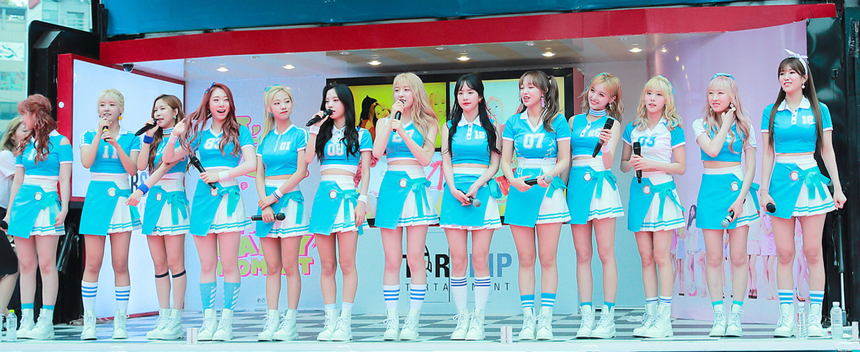 170701 우주소녀 신촌 게릴라